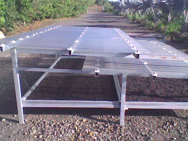 Les feuilles de tôles empêchent les graines de café de prendre l'eau quand il pleut.